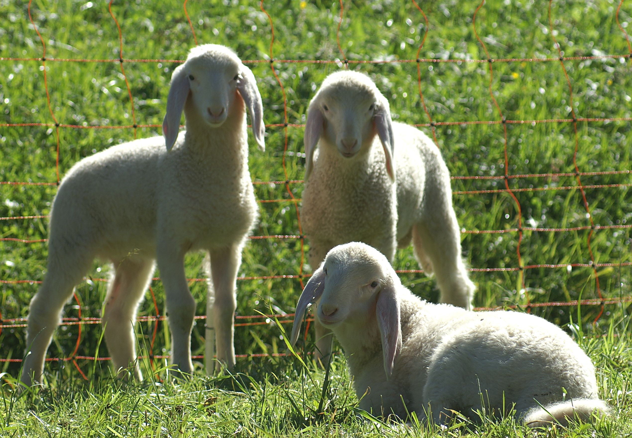 junge Lämmer des Hausschafes, Vorarlberg, Austria.